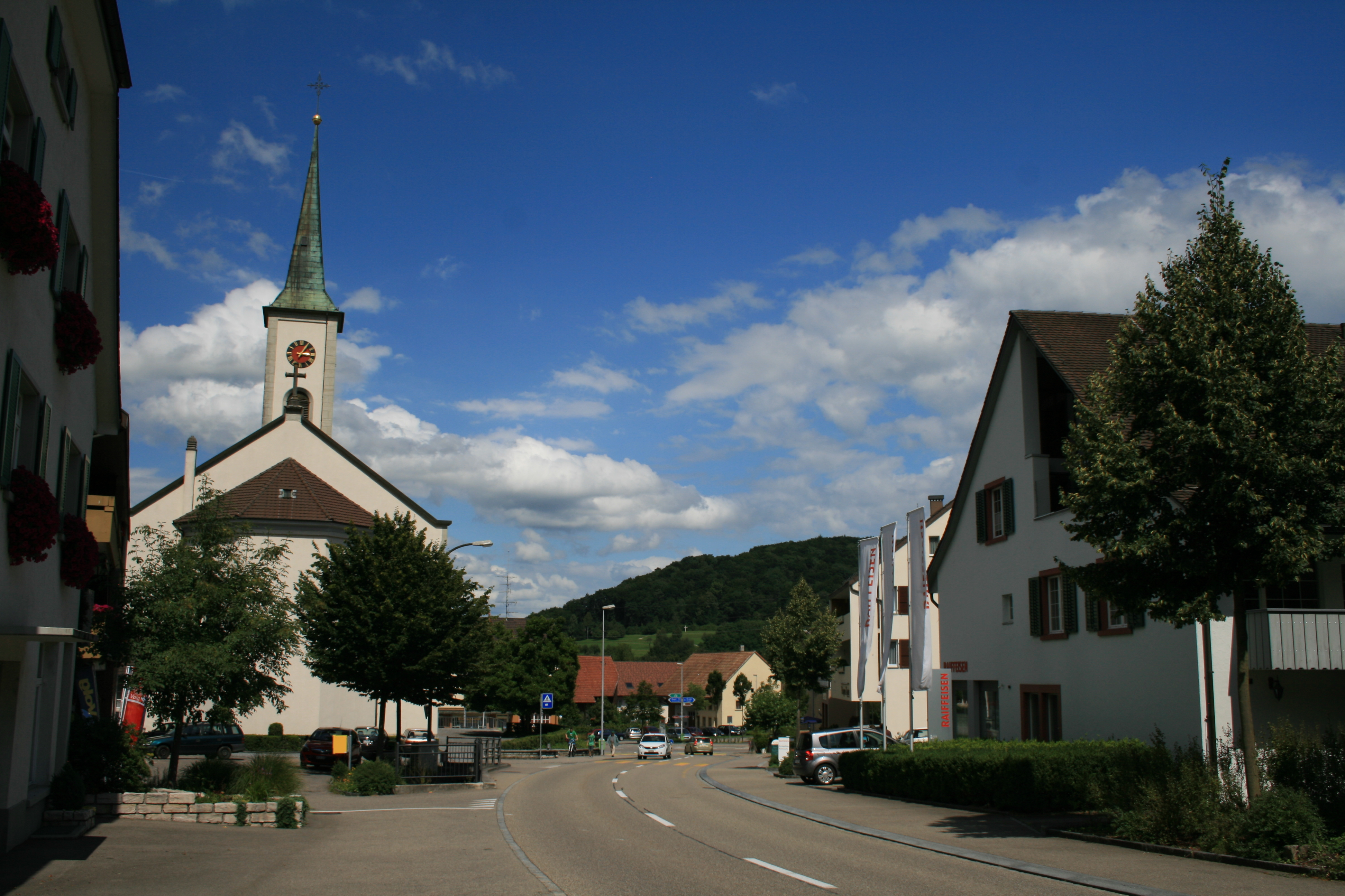 Eiken, Aargau